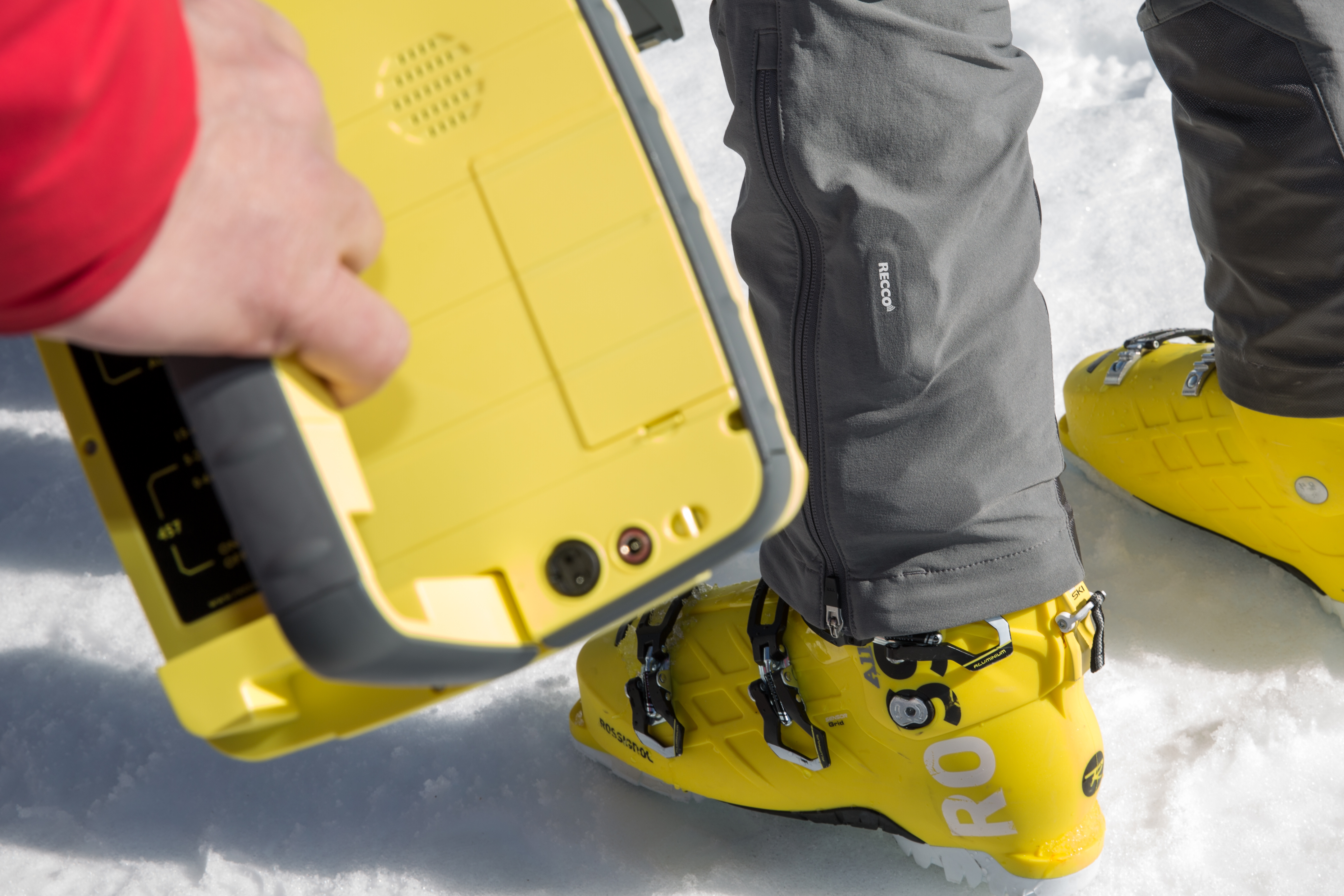 Detector RECCO apuntando a un reflector RECCO integrado en el pantalón.